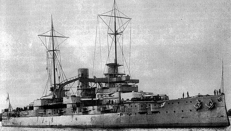 Schlachtschiff Rheinland